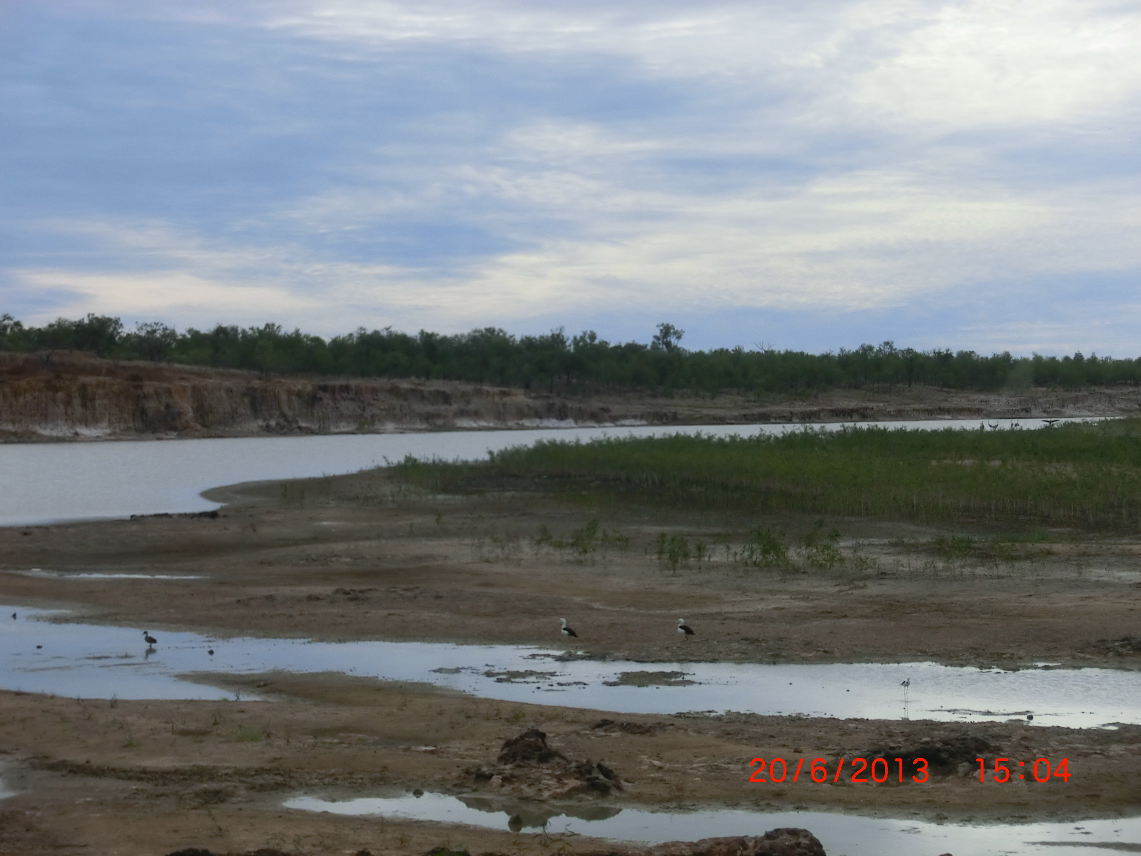 Alexandra River